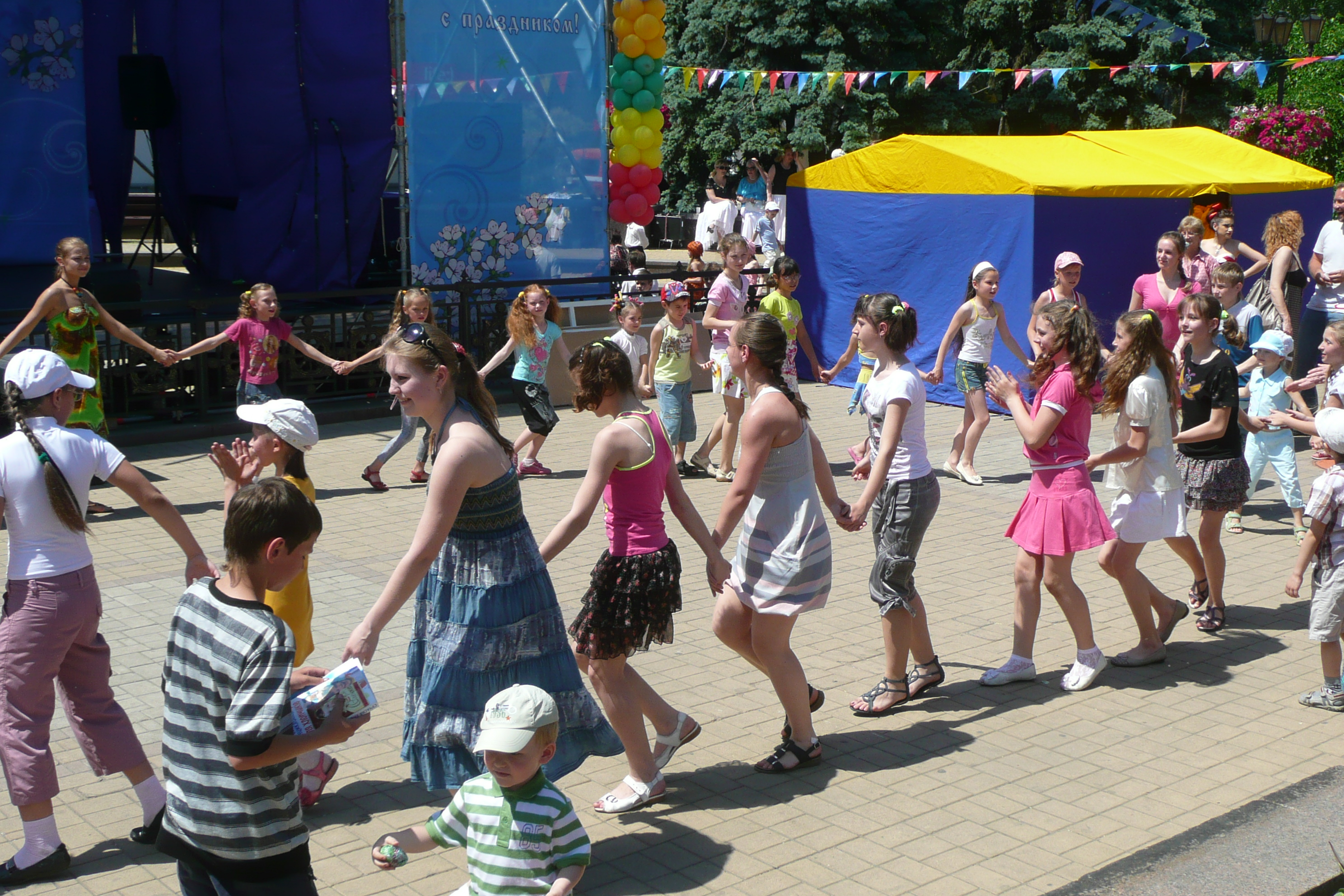 День защиты детей в Донецке